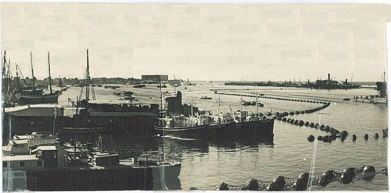 מעגן ספינות המשמר הבריטיות, בנמל חיפה, מוקף בשרשרות מצופים להגנה מפני חבלני הפלי"ם